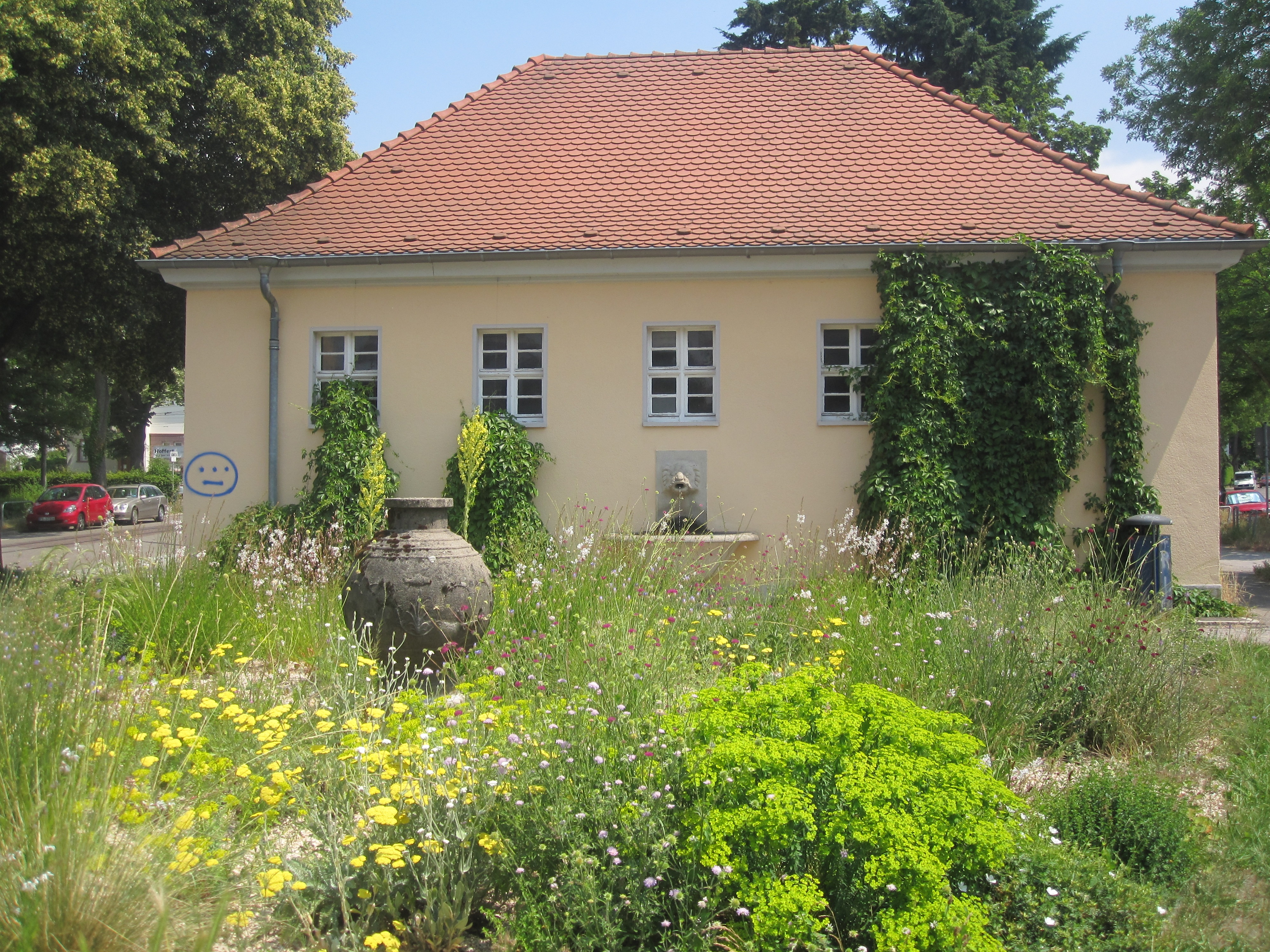 Hist. Unterwerk in der Günterstalstraße (Freiburg)